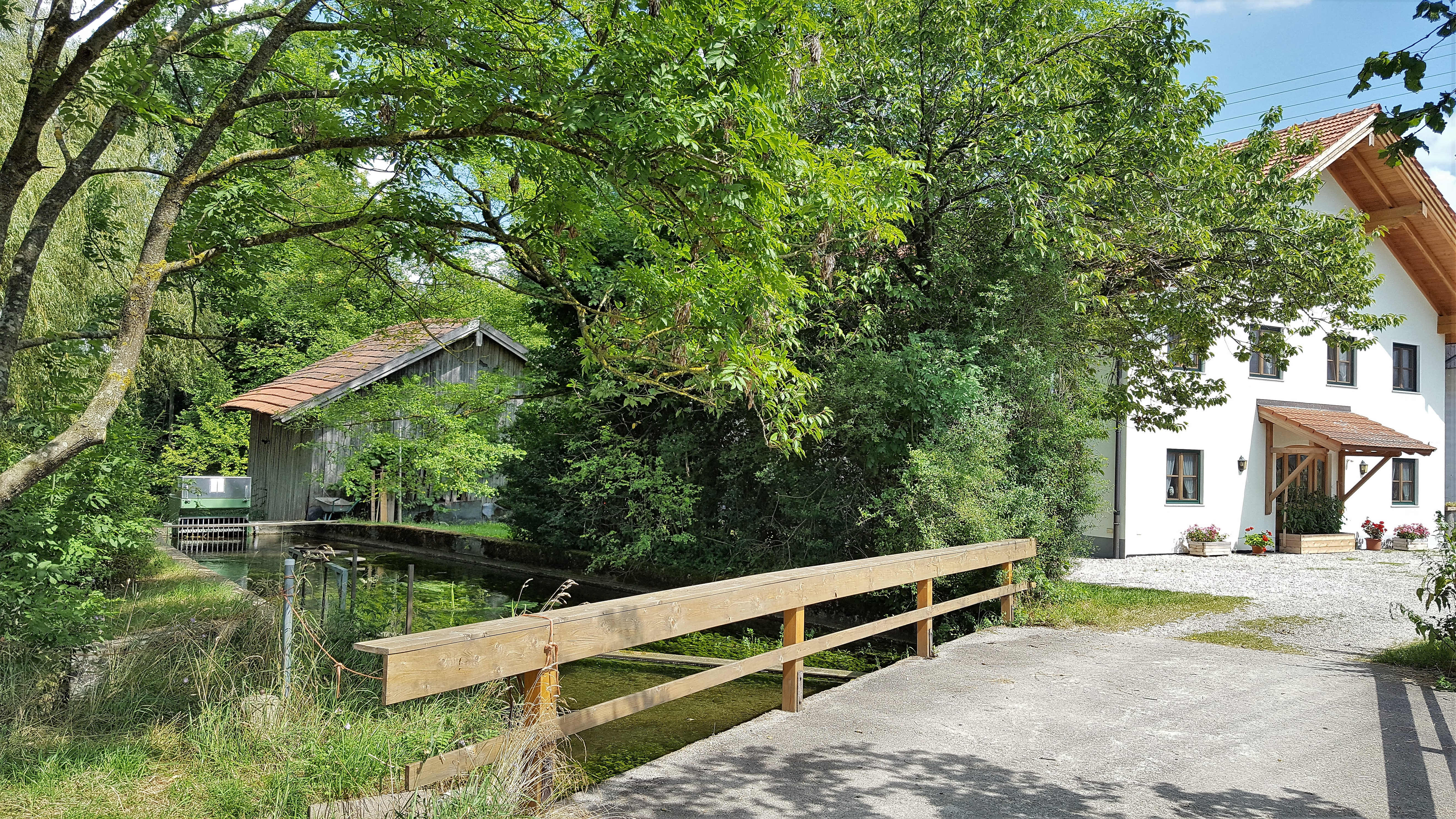 Kressiermühle